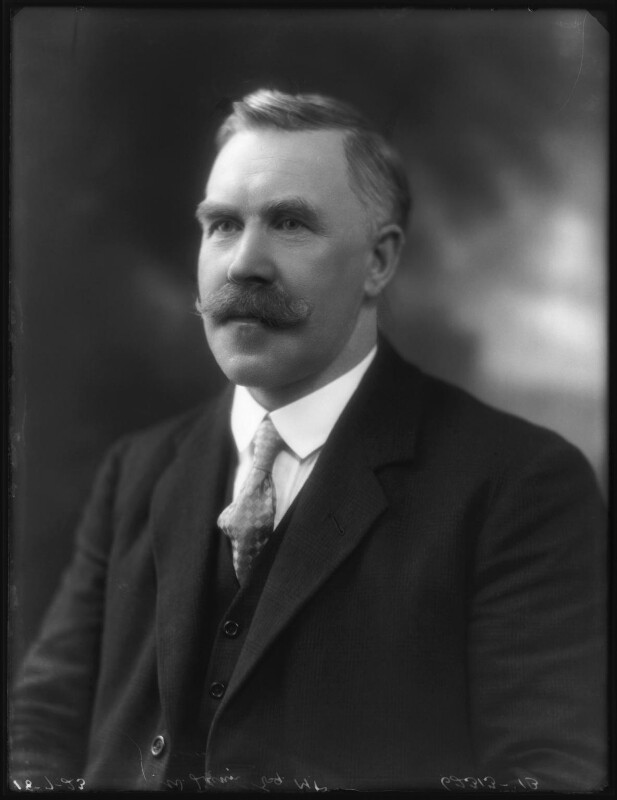 William Lunn